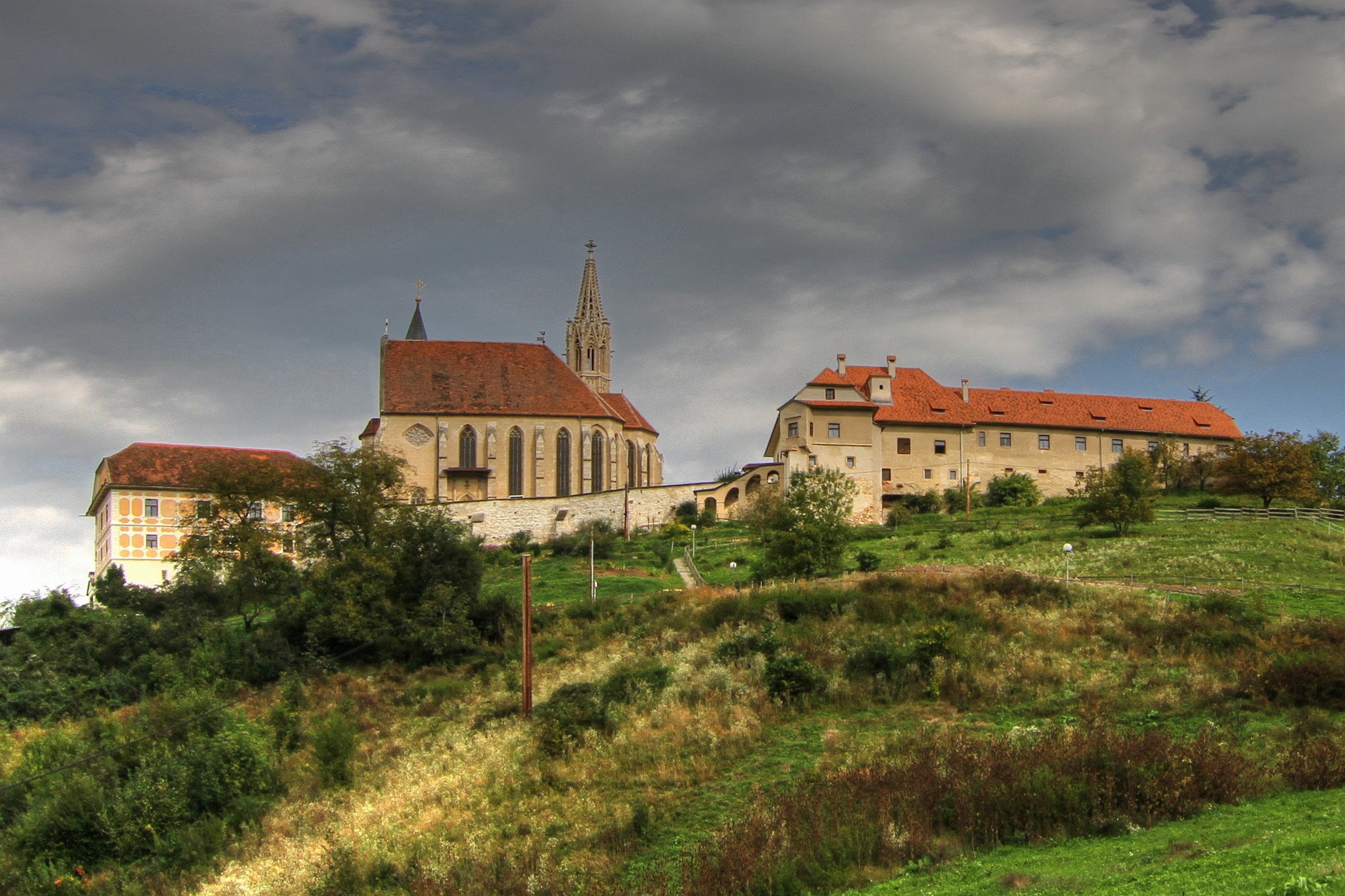 Ehem. Benefiziatenhaus, sog. Neugebäude; Wallfahrtskirche hl. Maria Straßengel; Pfarrhof (von links nach rechts), Österreich Wallfahrtskirche hl. Maria Straßengel: Pfarrhof: Ehem. Benefiziatenhaus